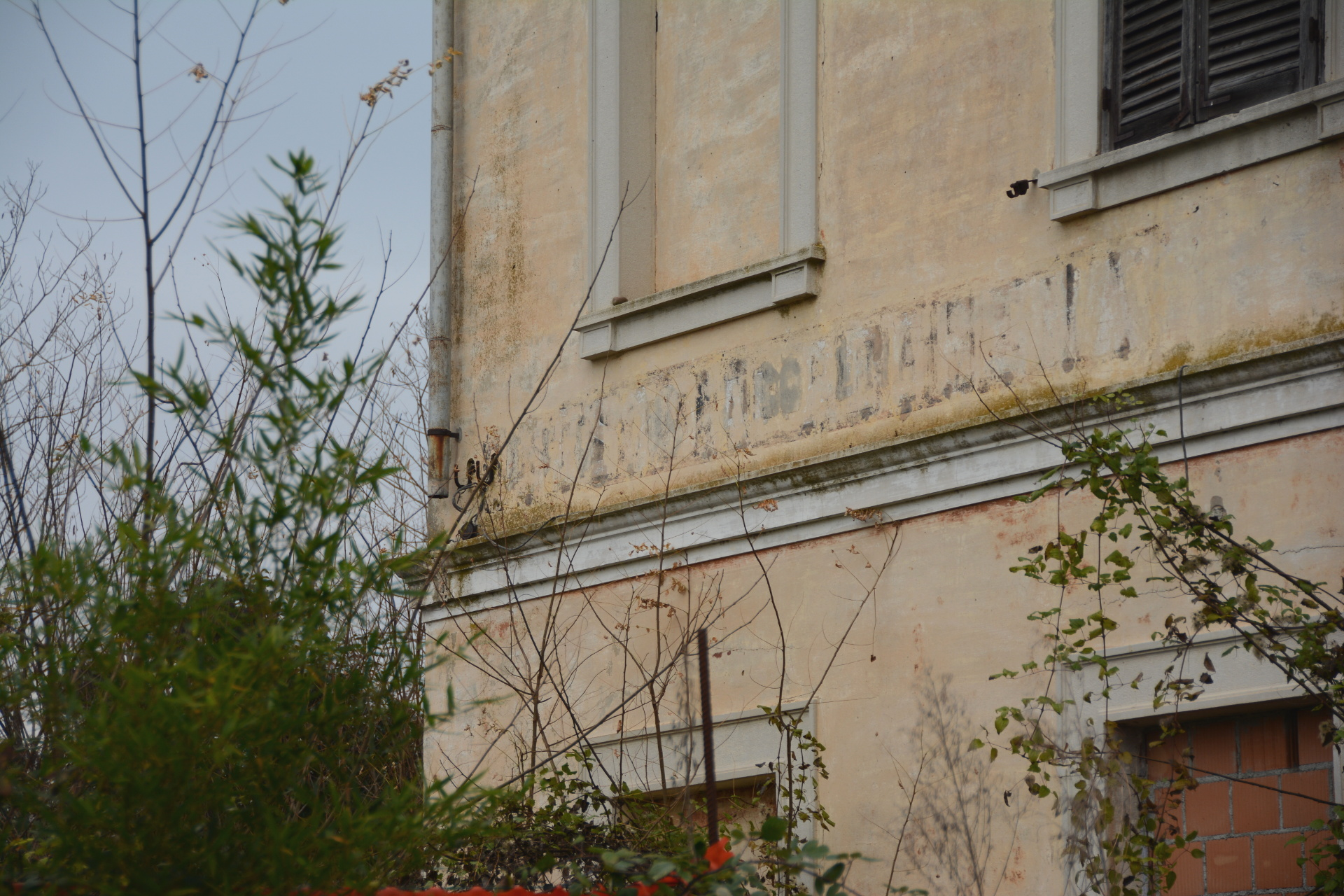 Particolare dell'indicazione della stazione dismessa di Sesto al Reghena